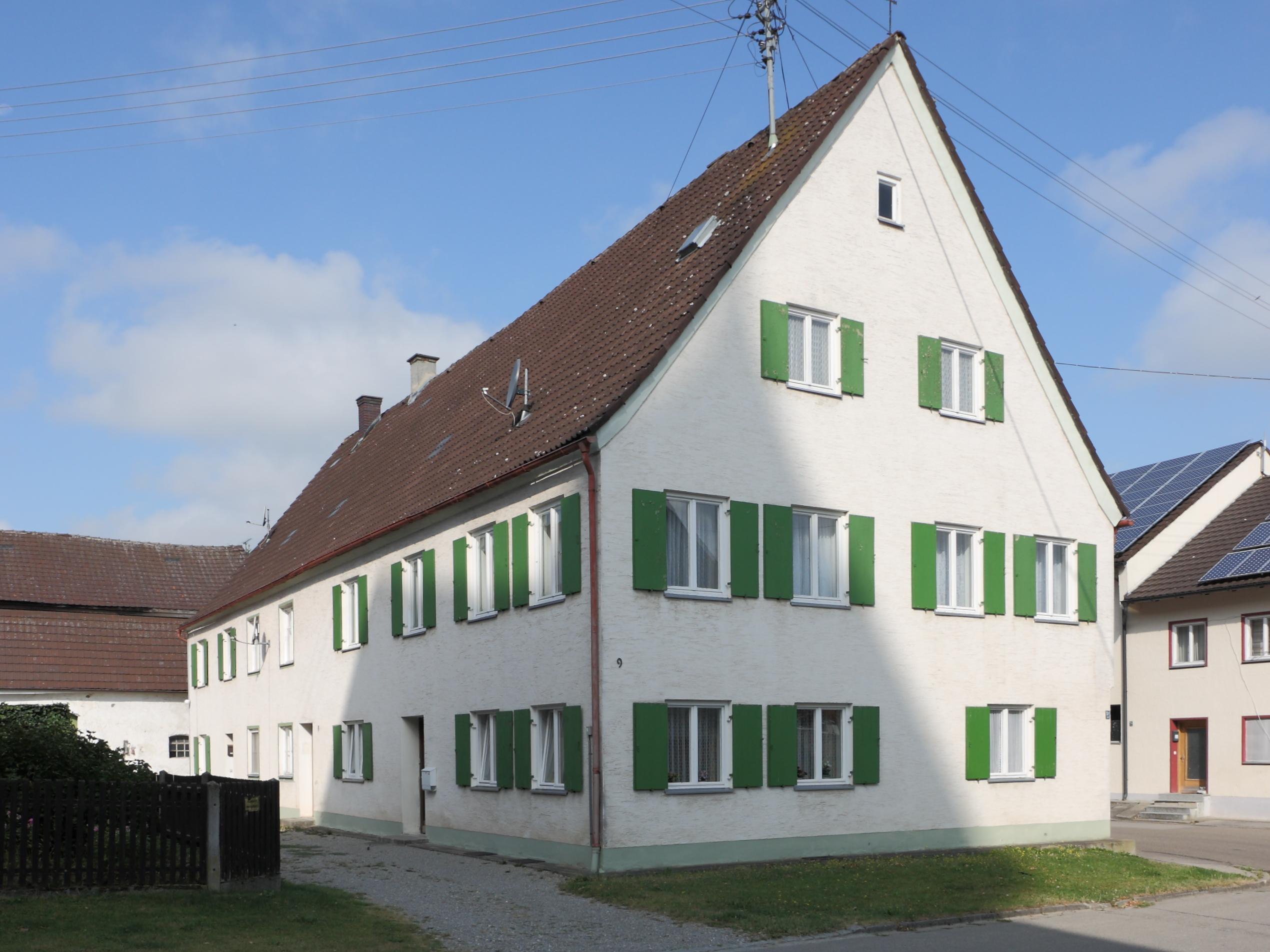 Ehemaliges Frühmesserhaus, erbaut 1730, Fassadengestaltung stark verändert